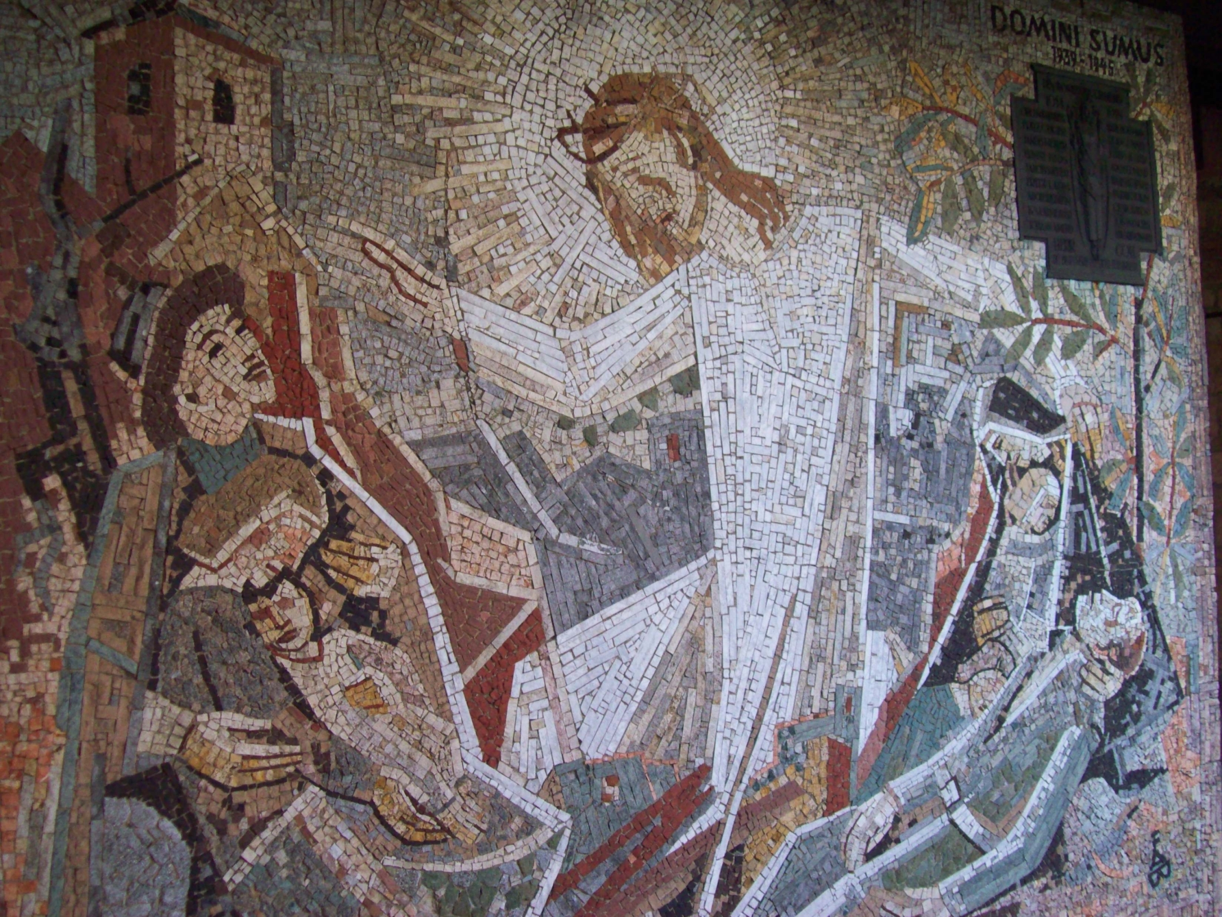 Pauluskirche Aschaffenburg (Mosaik zum Andenken an die Opfer des Krieges) im Innenhof von Alois Bergmann-Franken